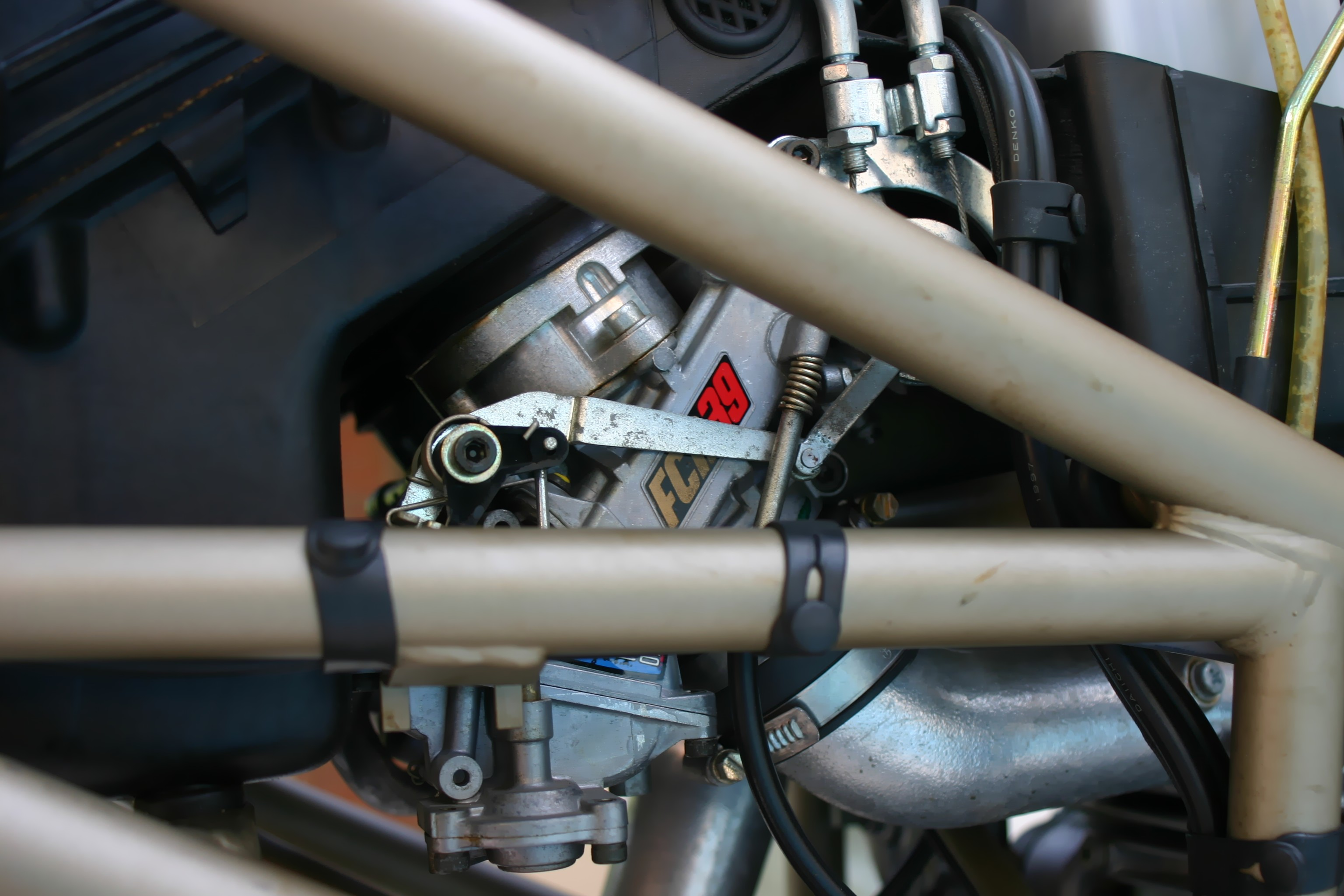 Keihin 39mm flat slide carbs